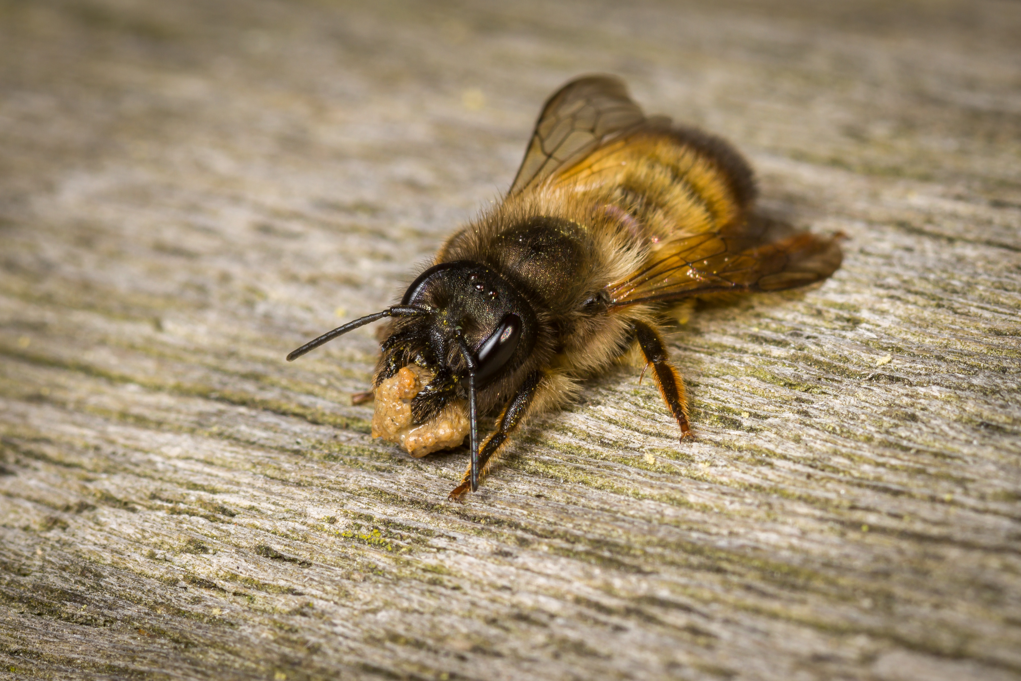 Osmia cornuta bringt "Mörtel" für die Trennwand zwischen zwei Nestzellen.